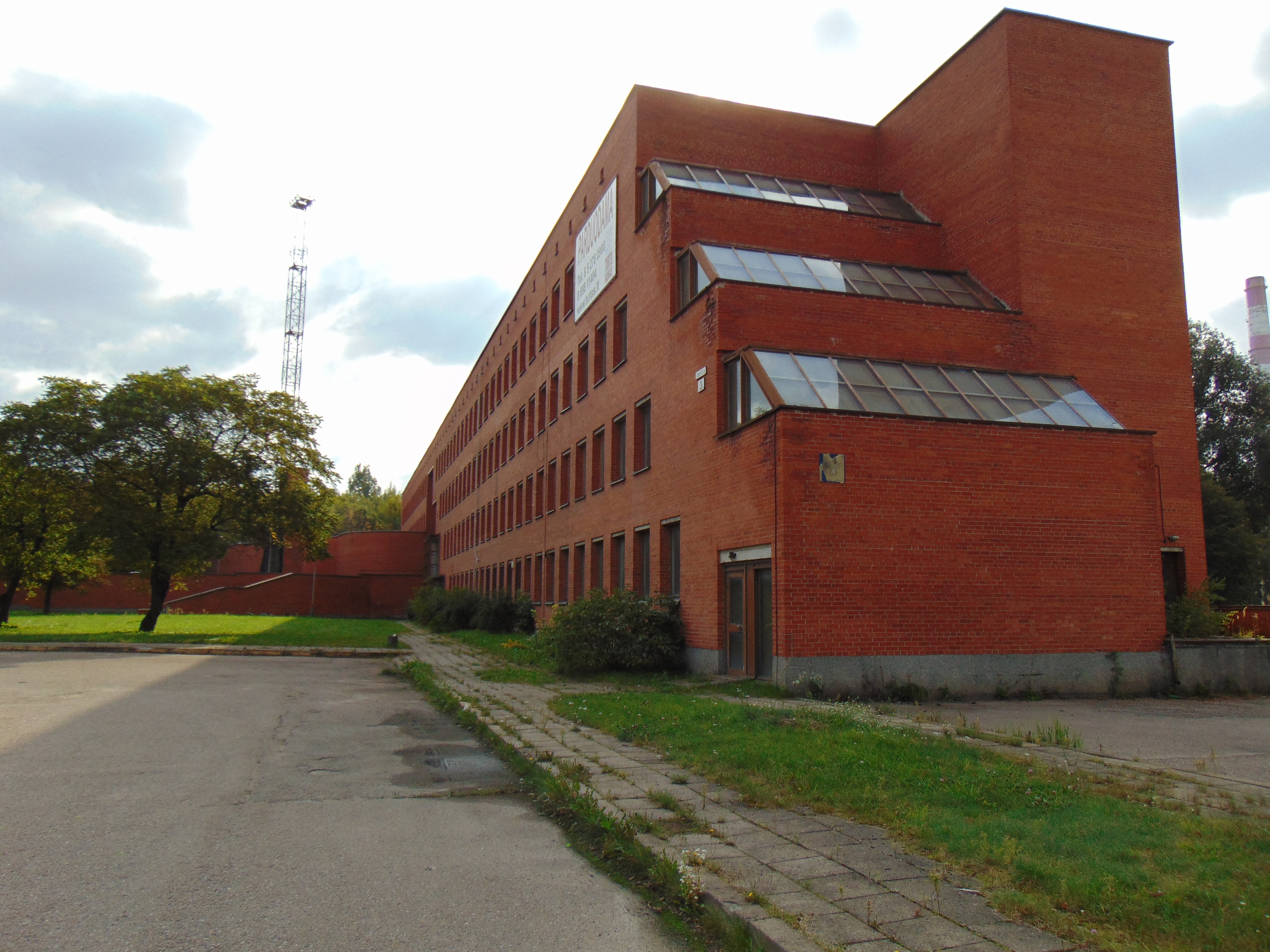 Lietuvos kelių policijos tarnybos pastatas 2015 m.